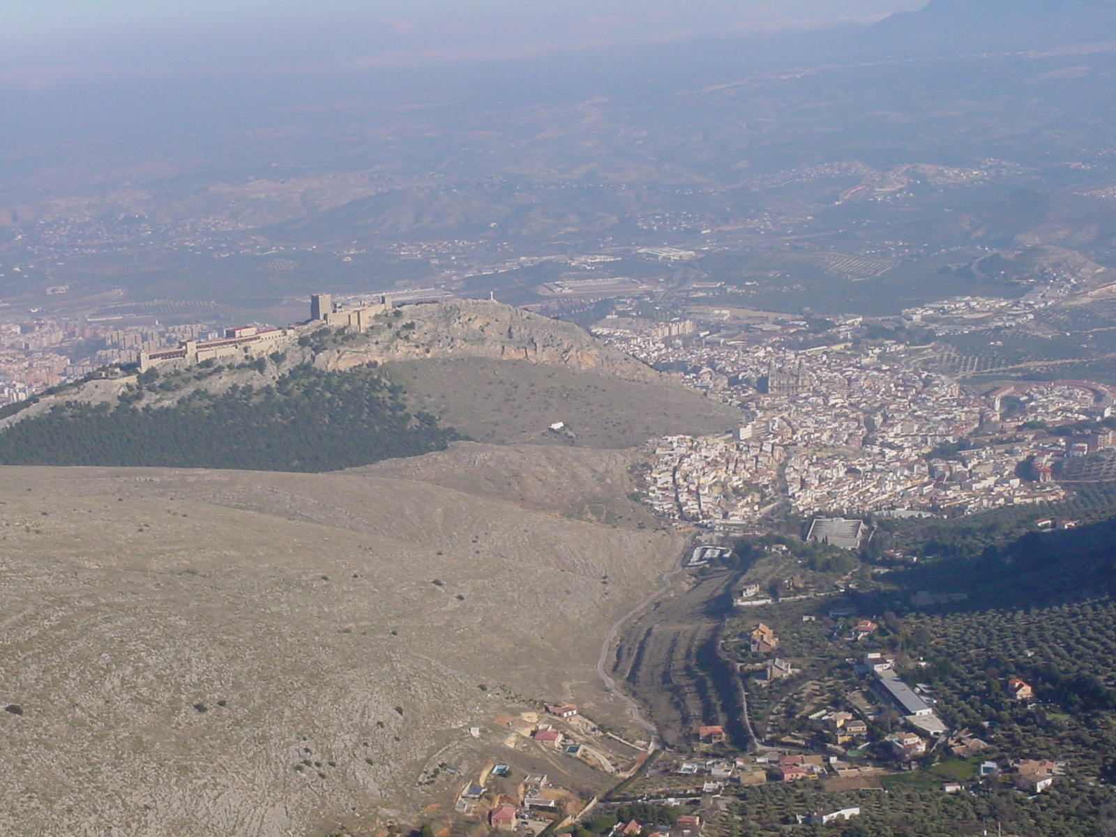 Jaén desde La Mella